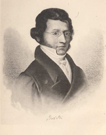 Ritratto conservato presso l'Orto Botanico dell'Università di Pavia